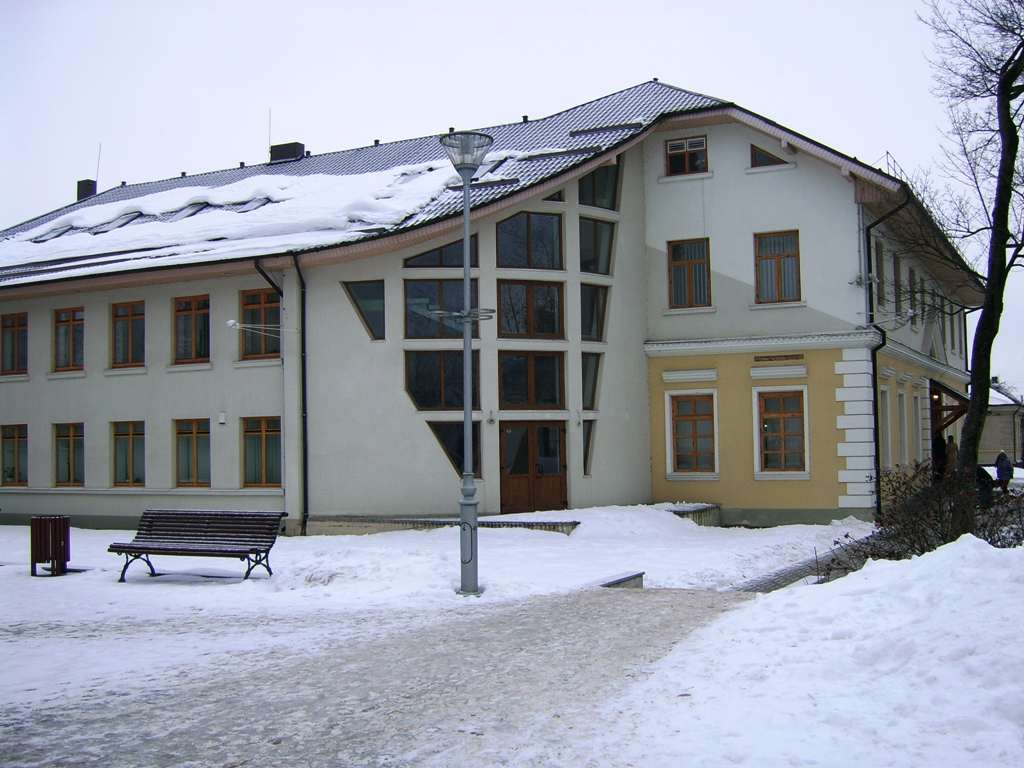 Tauragės paštas